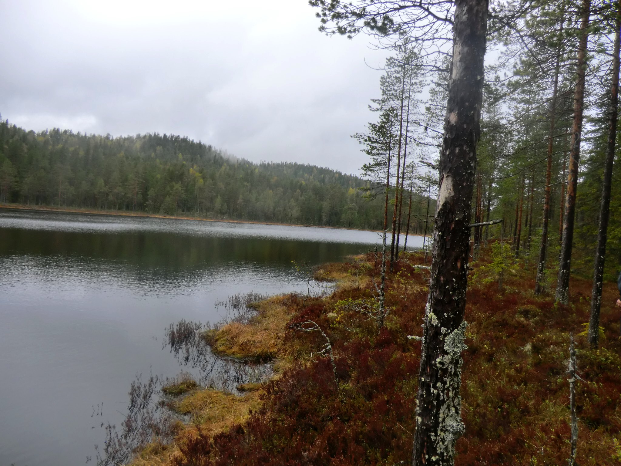 Utsikt västerut längst Stor-Abborrtjärnens strand.